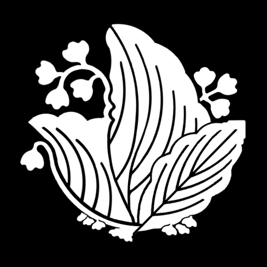 「桐揚羽蝶（桐蝶）」紋（染抜）